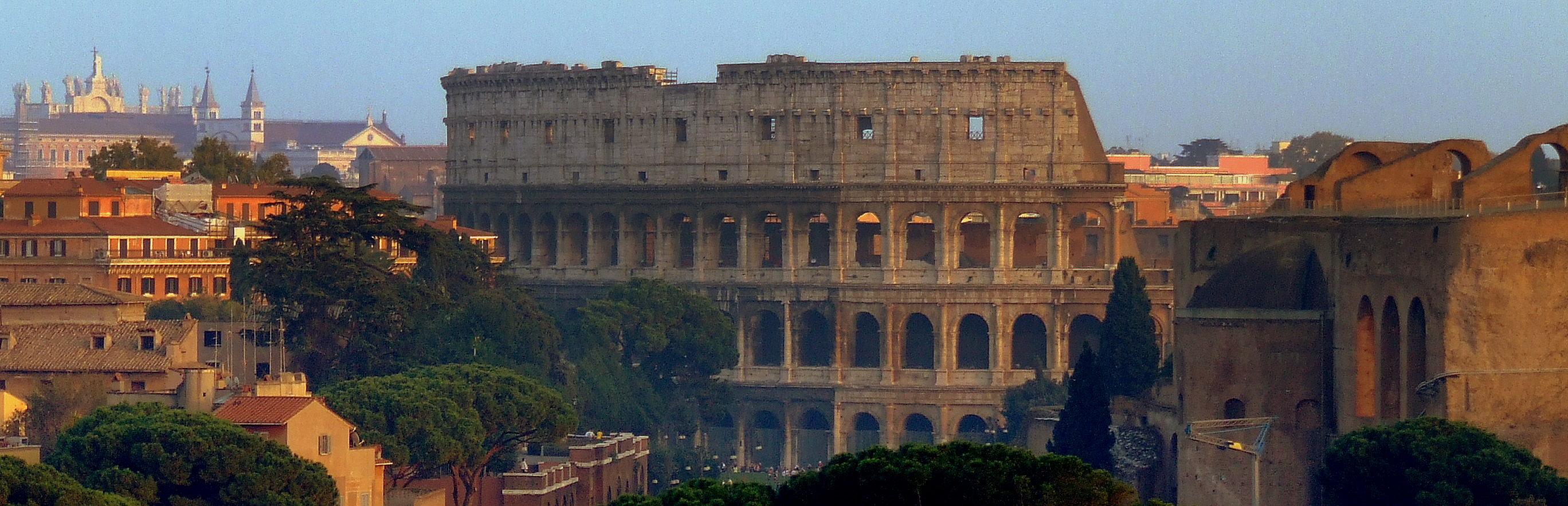 Vista del Colosseo dall'Altare della Patria